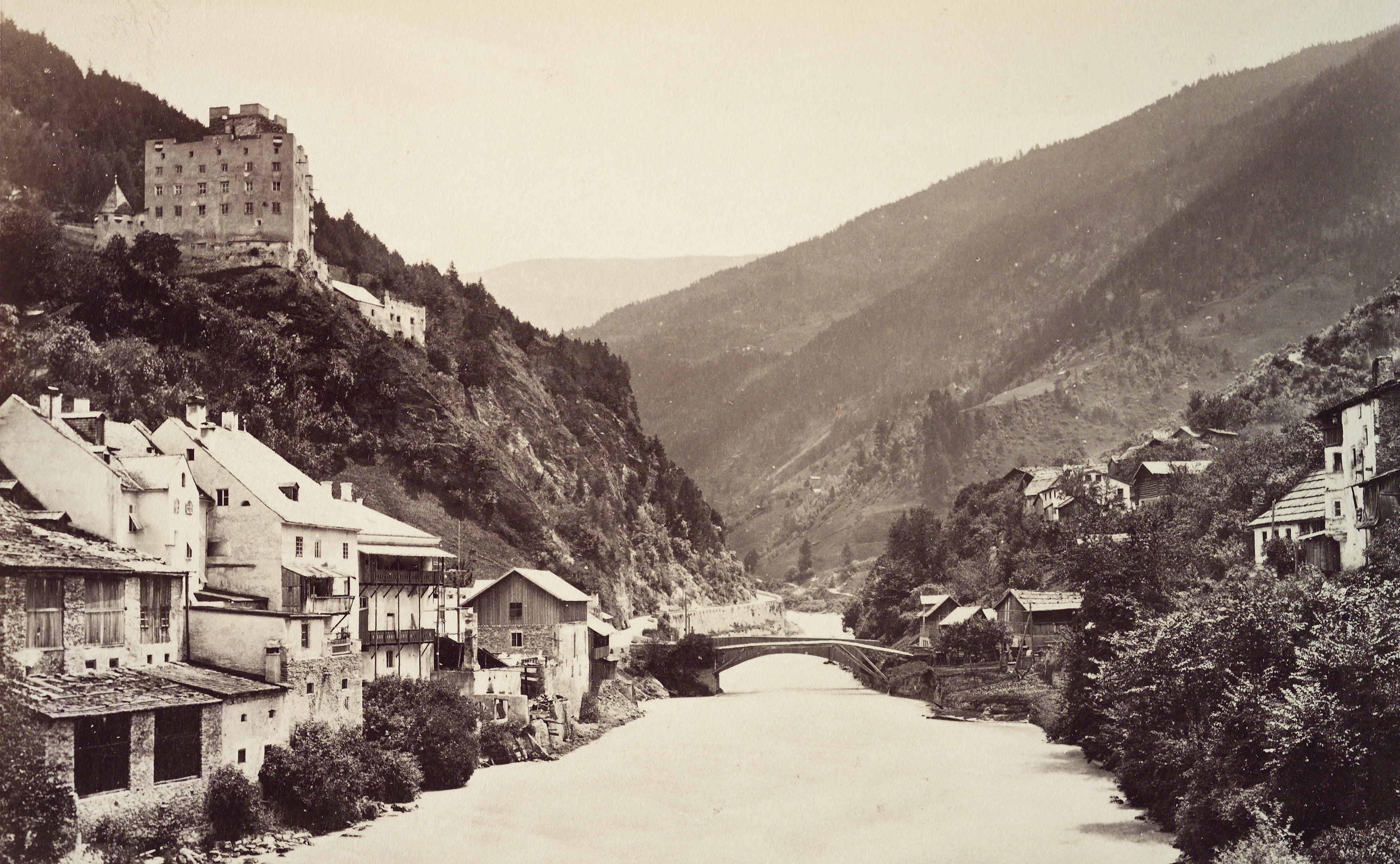 Landeck